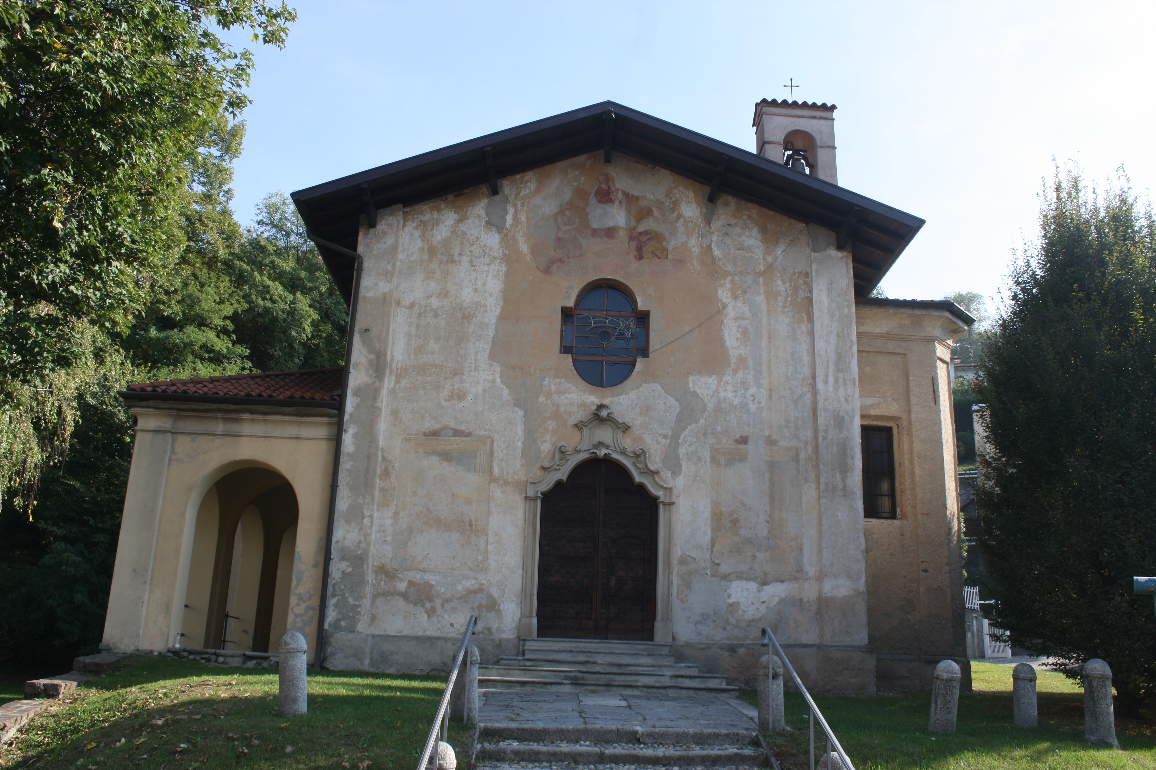 La chiesa di San Rocco ad Azzate, in provincia di Varese.